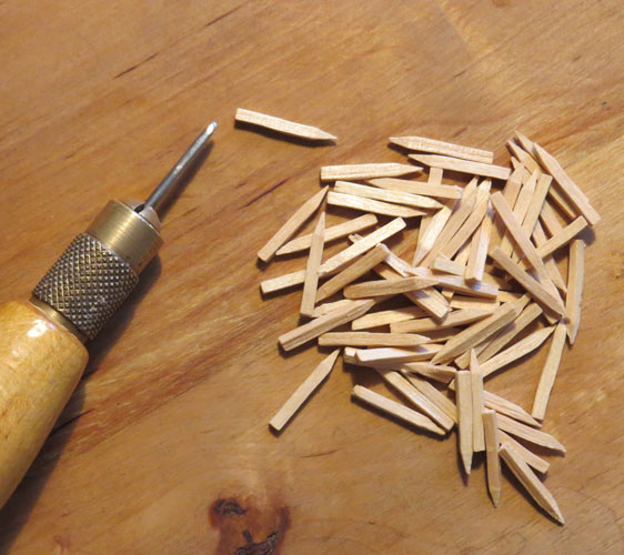 Pligg och syl